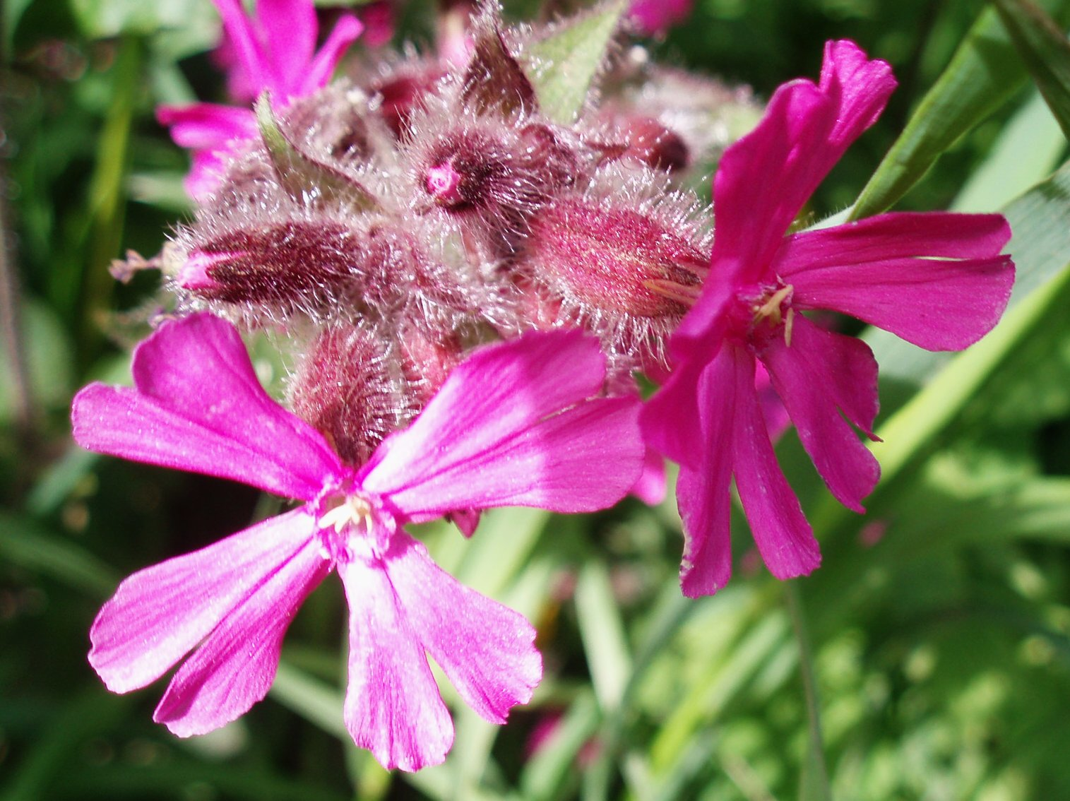 Silene dioica (de: Rote Lichtnelke) in Akureyri in Iceland